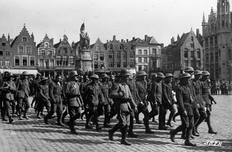 Englische Gefangene auf dem Marktplatz in Brügge, Mitte Juli 1917 (Gefangengenommen beim Angriff der dt, Marine-Infanterie an der Yser am 11. Juli, 1300 Gef. Aufn.: Filmtrupp No. 3 Information added by Wikimedia users.